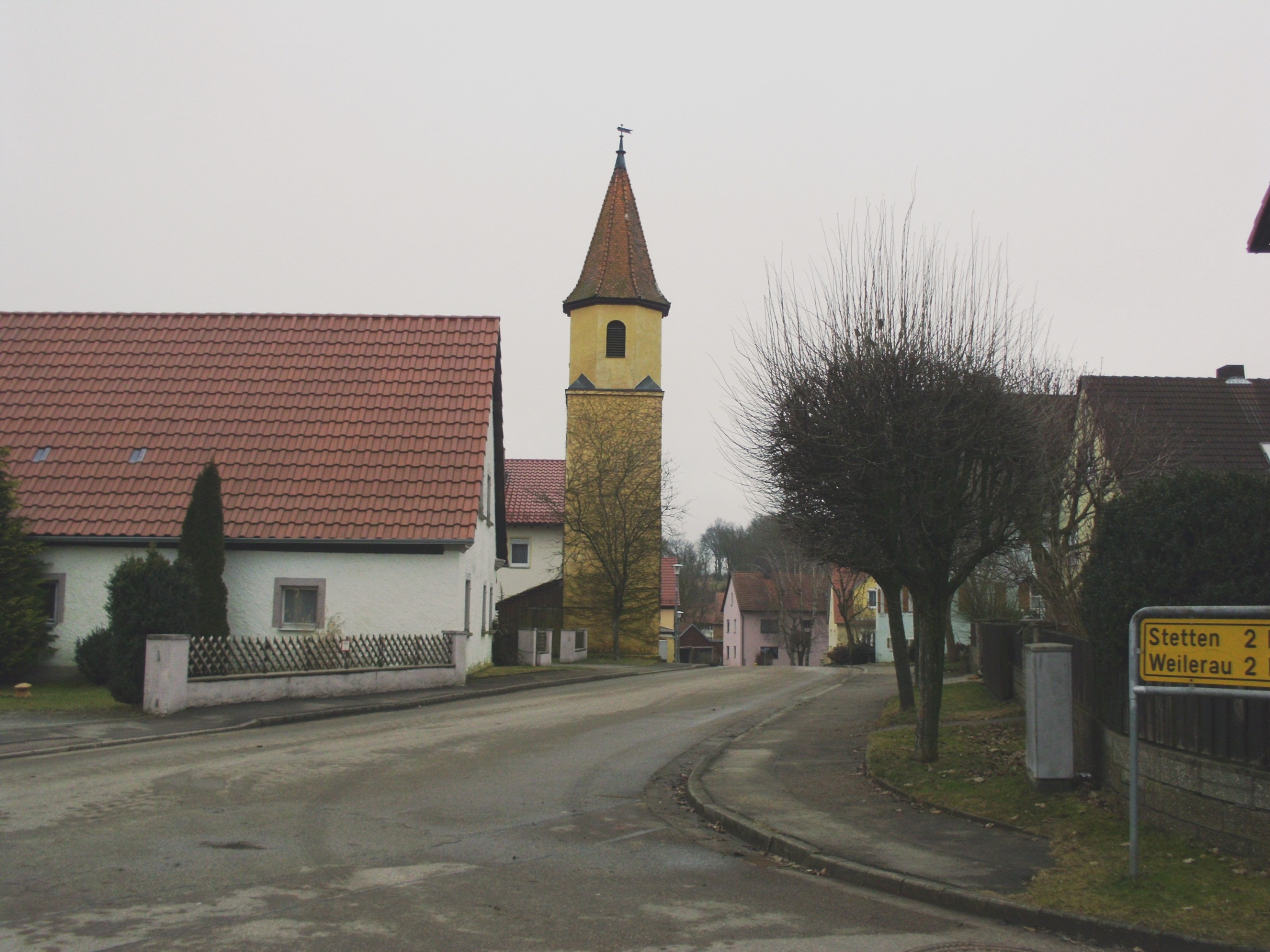 Nordstetten, Ortsteil von Gunzenhausen im mittelfränkischen Landkreis Weißenburg-Gunzenhausen